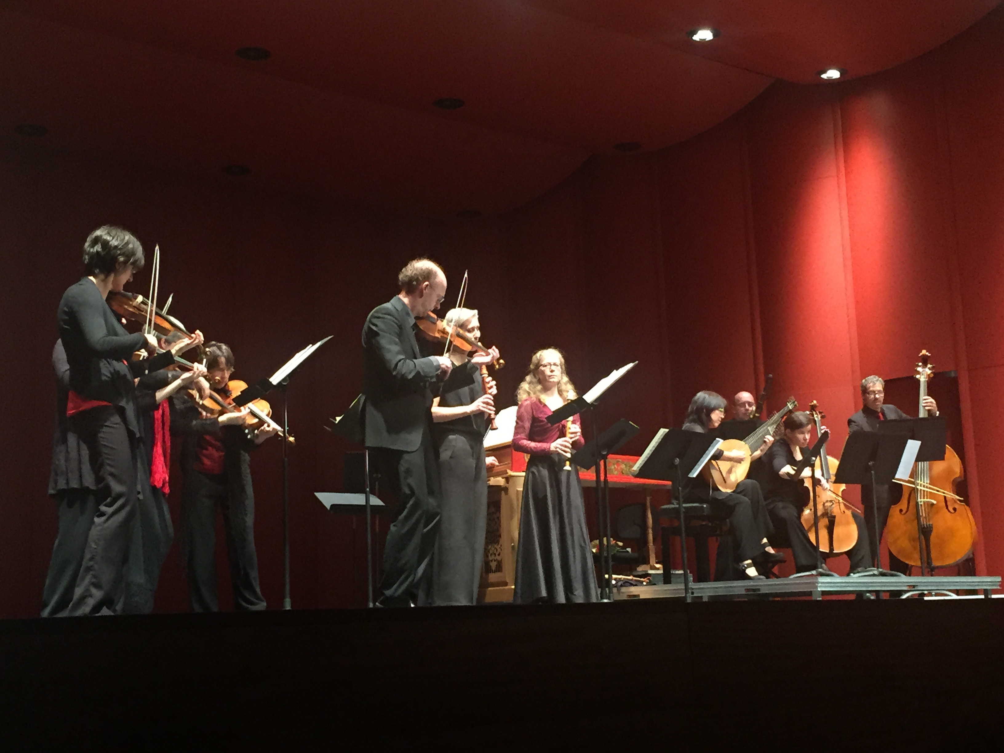 L'orquestra Akademie für Alte Musik Berlin al teatre l'Atlàntida de Vic.